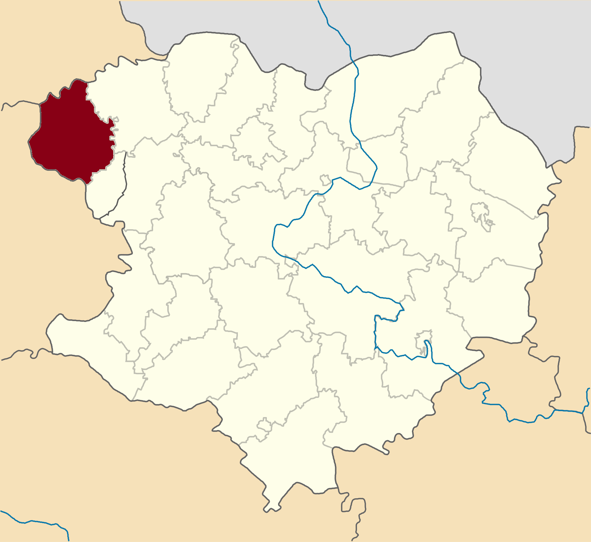 Krasnokutskyi-Raion map